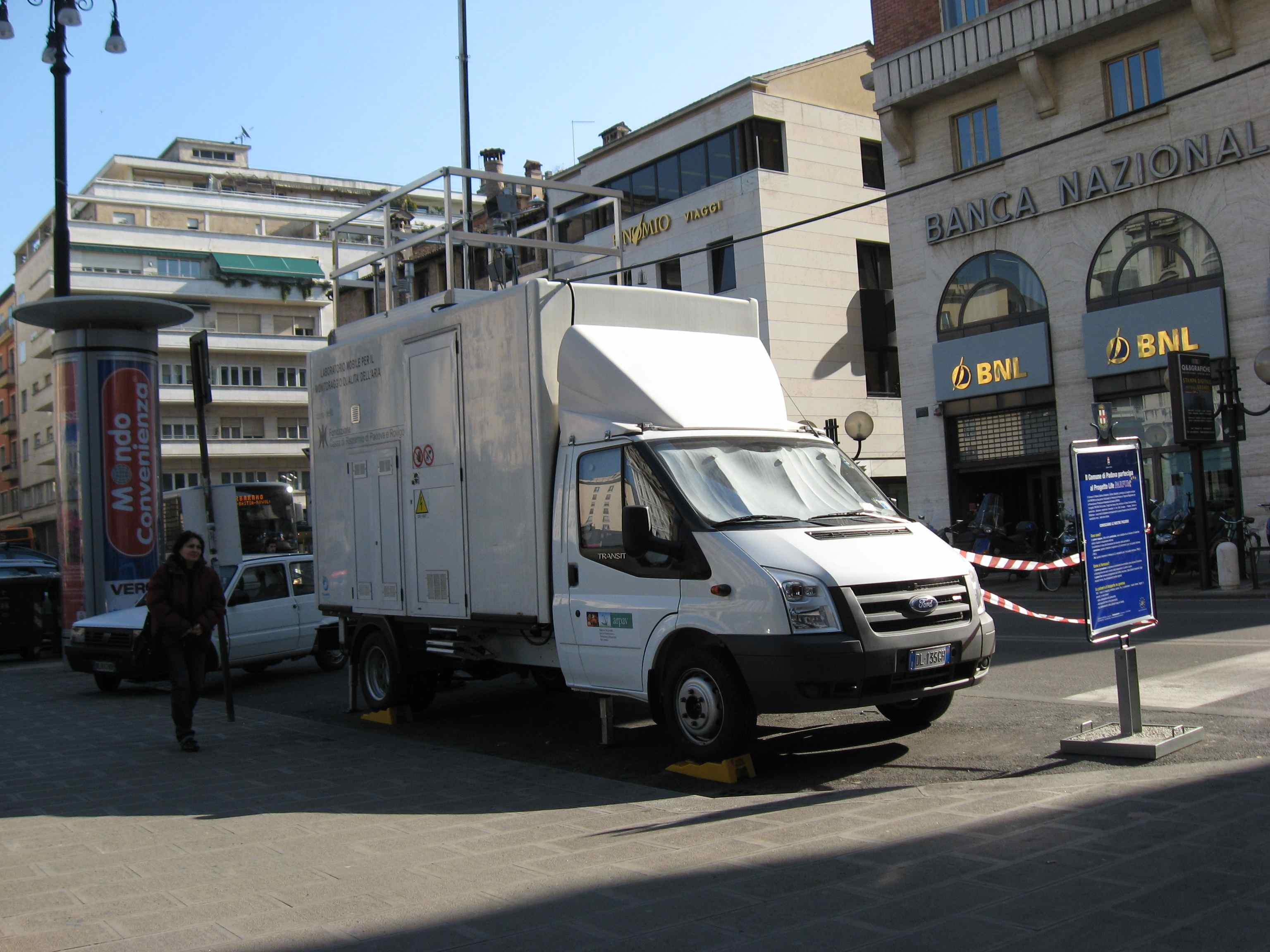 Ford Transit dell'ARPAV esegue controllo dell'aria